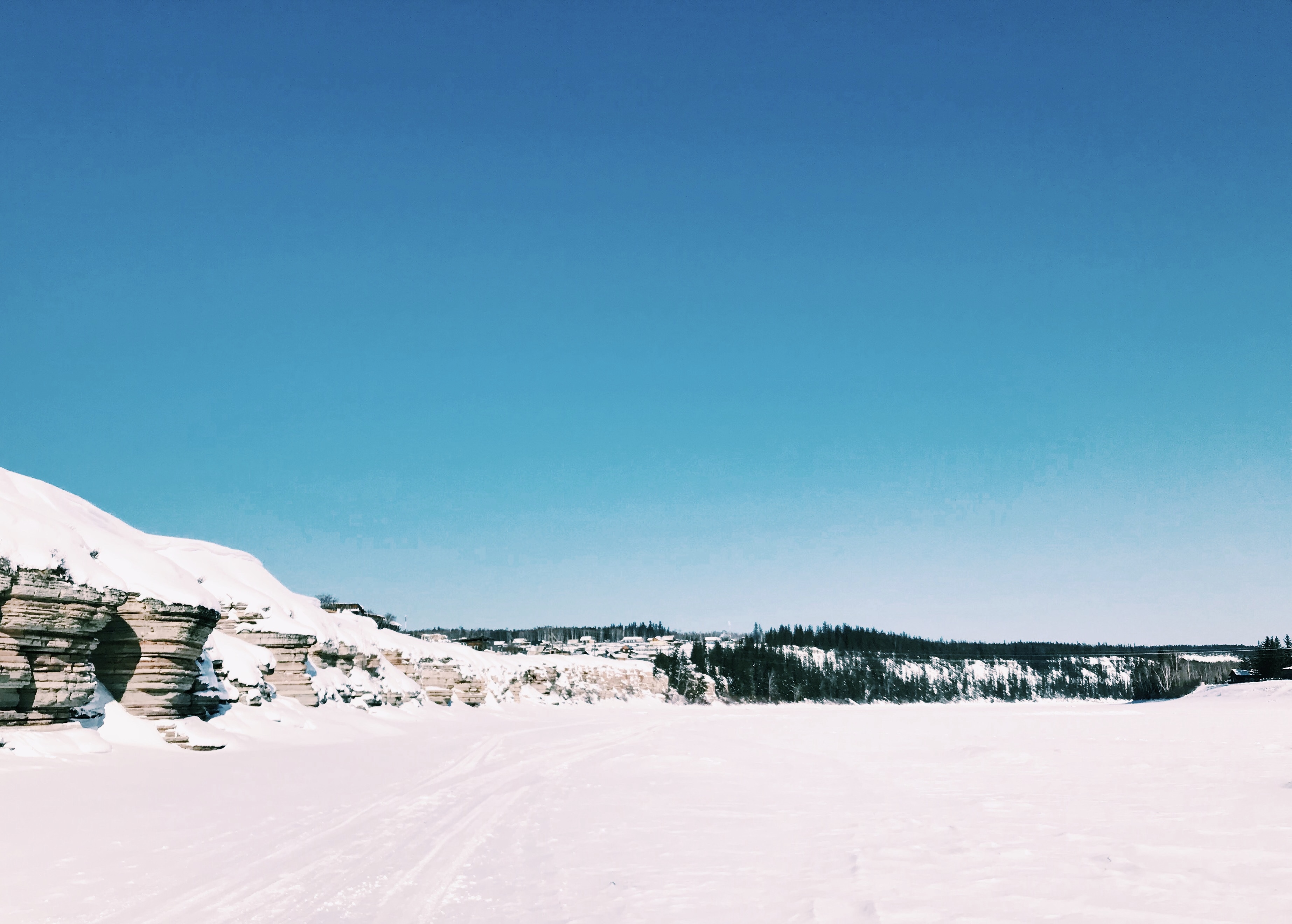 Сиинэ (Синяя): Якутия (Саха) This image is related to the protected area of Russia number 1410003